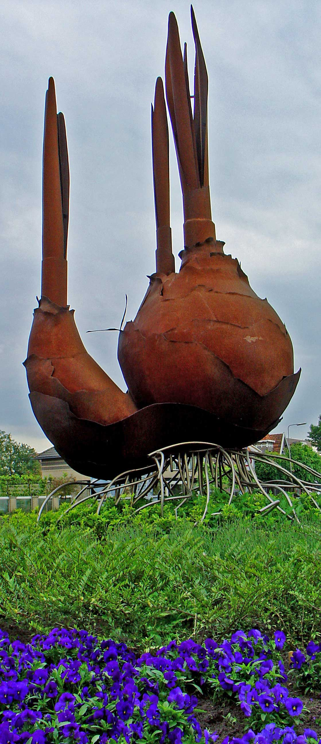 Moeder en kind, vergrote replica van een beeld van een volwassen en een jonge narcisbol, door Fons Versluijs gemaakt voor de Floriade in Zoetermeer in 1992, deze replica bevindt zich in Voorhout (gemeente Teylingen) op de Jacoba van Beierenweg